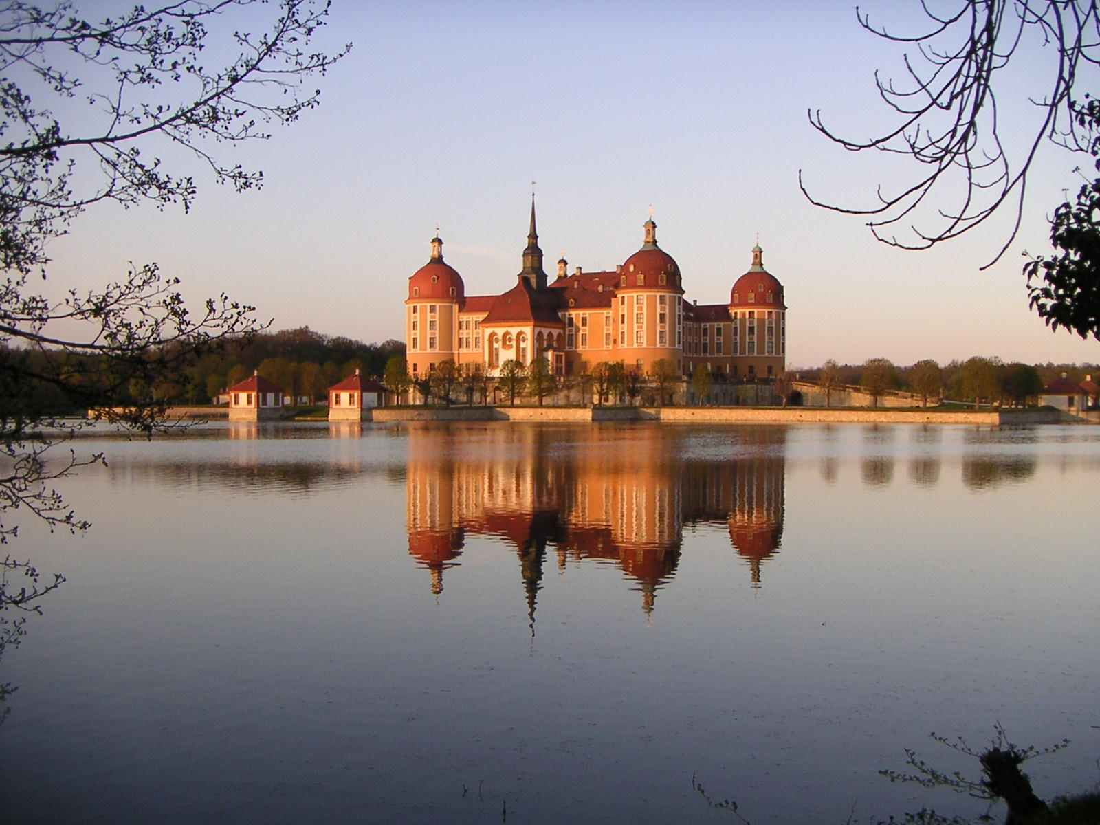 Schloss Moritzburg in der Abenddämmerung